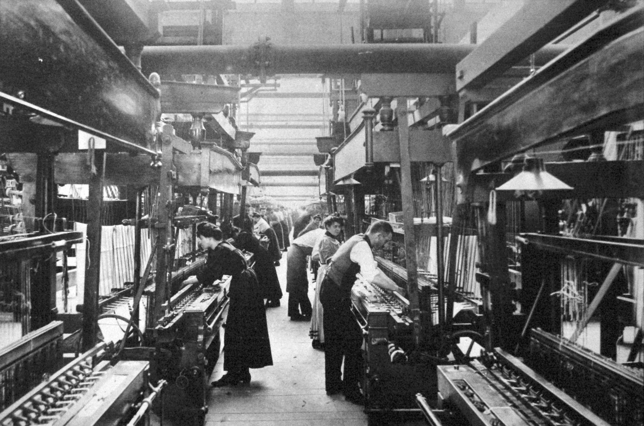 Atelier de tissage de la soie à Voiron, au début du XX siècle. Reproduction exposé au Musée de la viscose, Échirolles, Isère, France, depuis une photo conservé dans la collection du Musée Dauphinois de Grenoble.